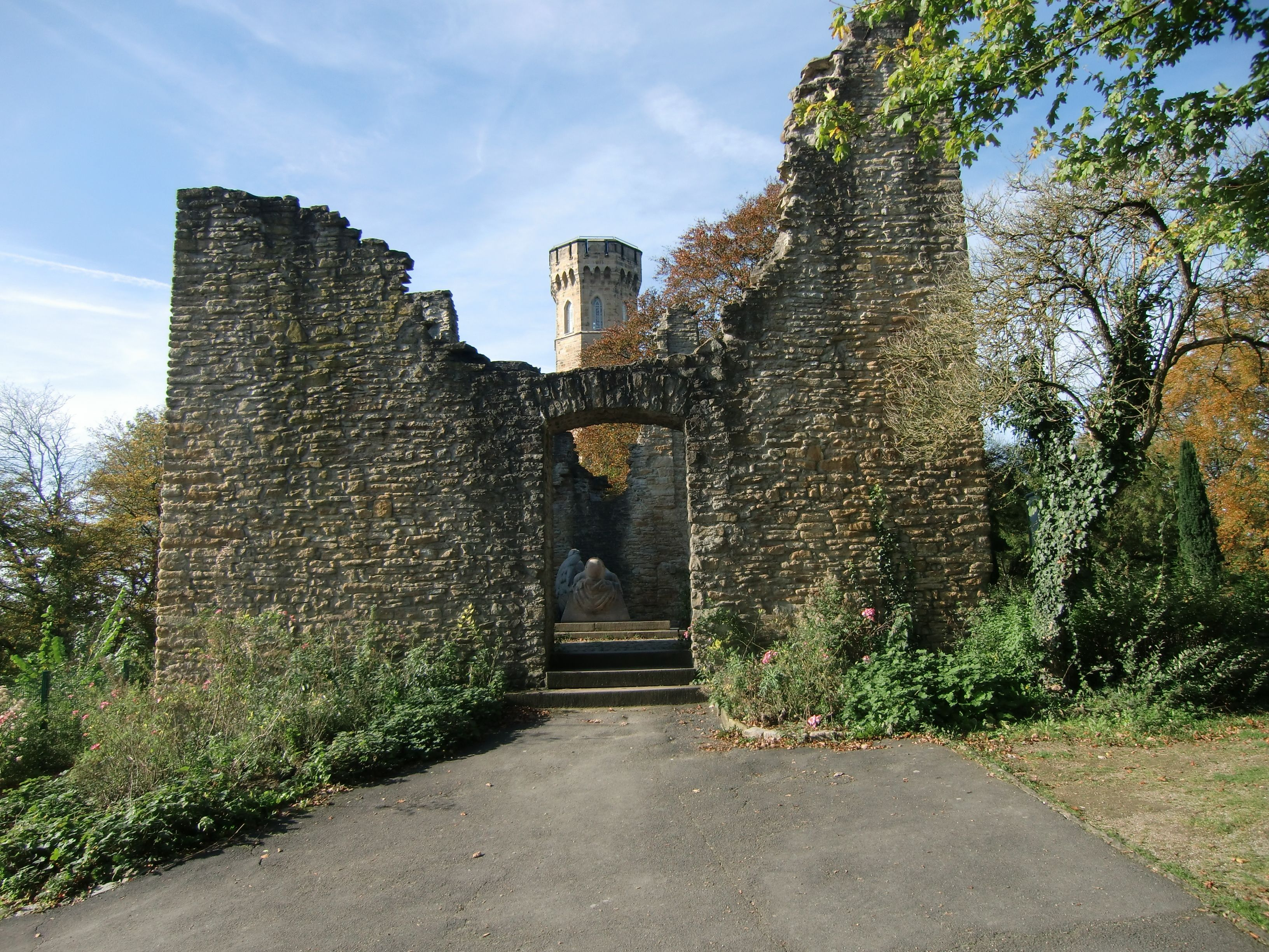 Burgruine Hohensyburg in Dortmund-Syburg, Vincketurm im Hintergrund